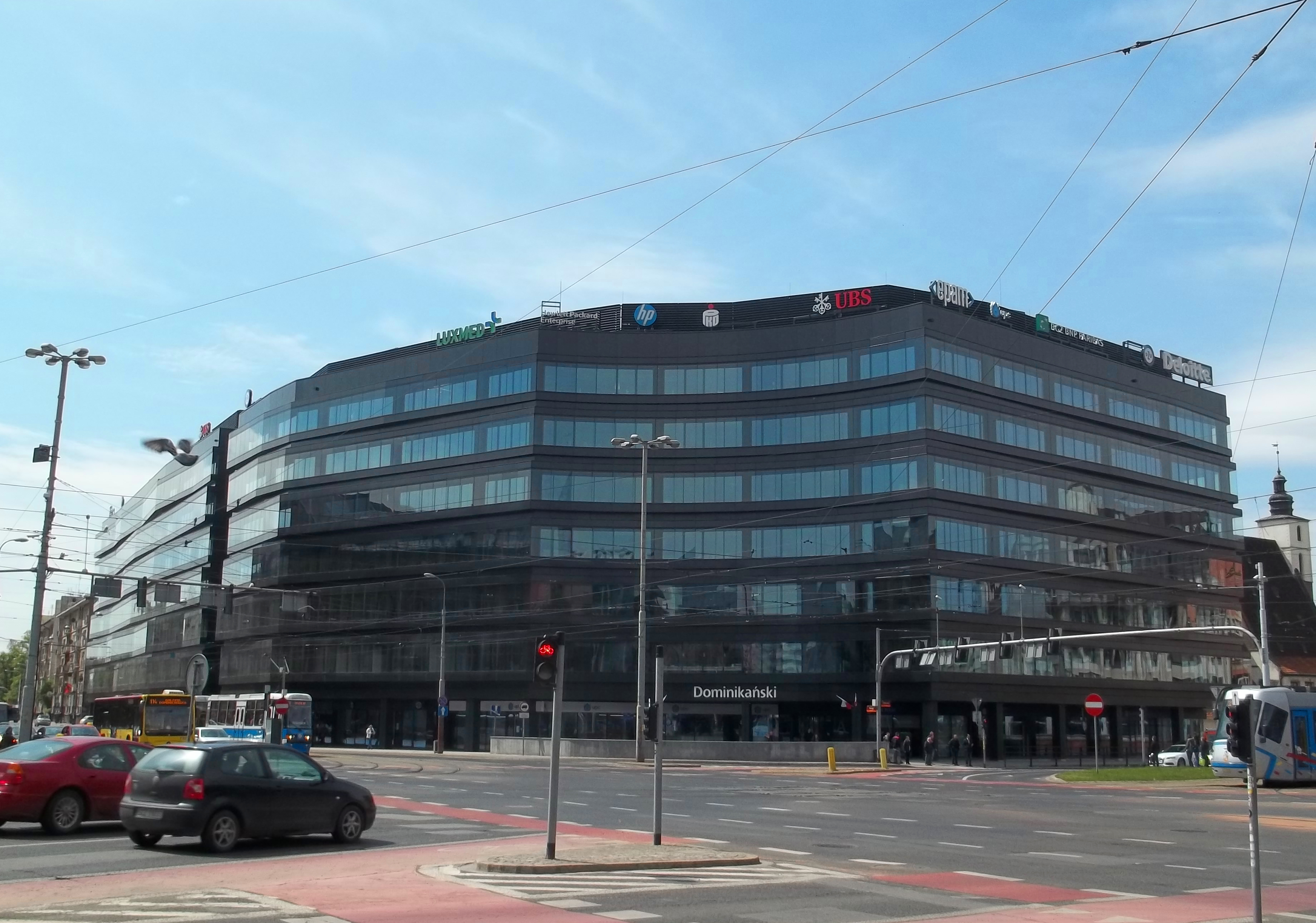 Galeria Dominkańska 2017